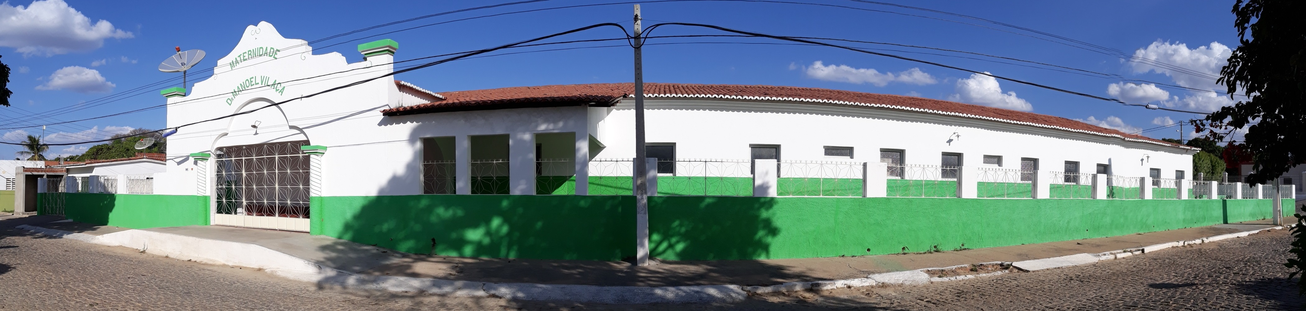 Português do Brasil: Maternidade Dr. Manoel Vilaça em Martins, Rio Grande do Norte (Brasil)